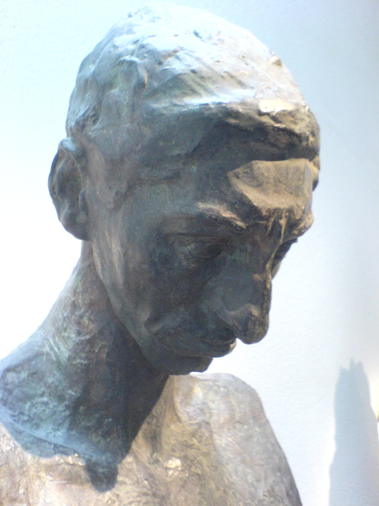 Portrait du critique d'art Mécislas Goldberg (1868 - 1907) par Antoine Bourdelle. Bronze, Rudier N°1. Legs Rhodia Dufet-Bourdelle, 2002 (MB br.1169)